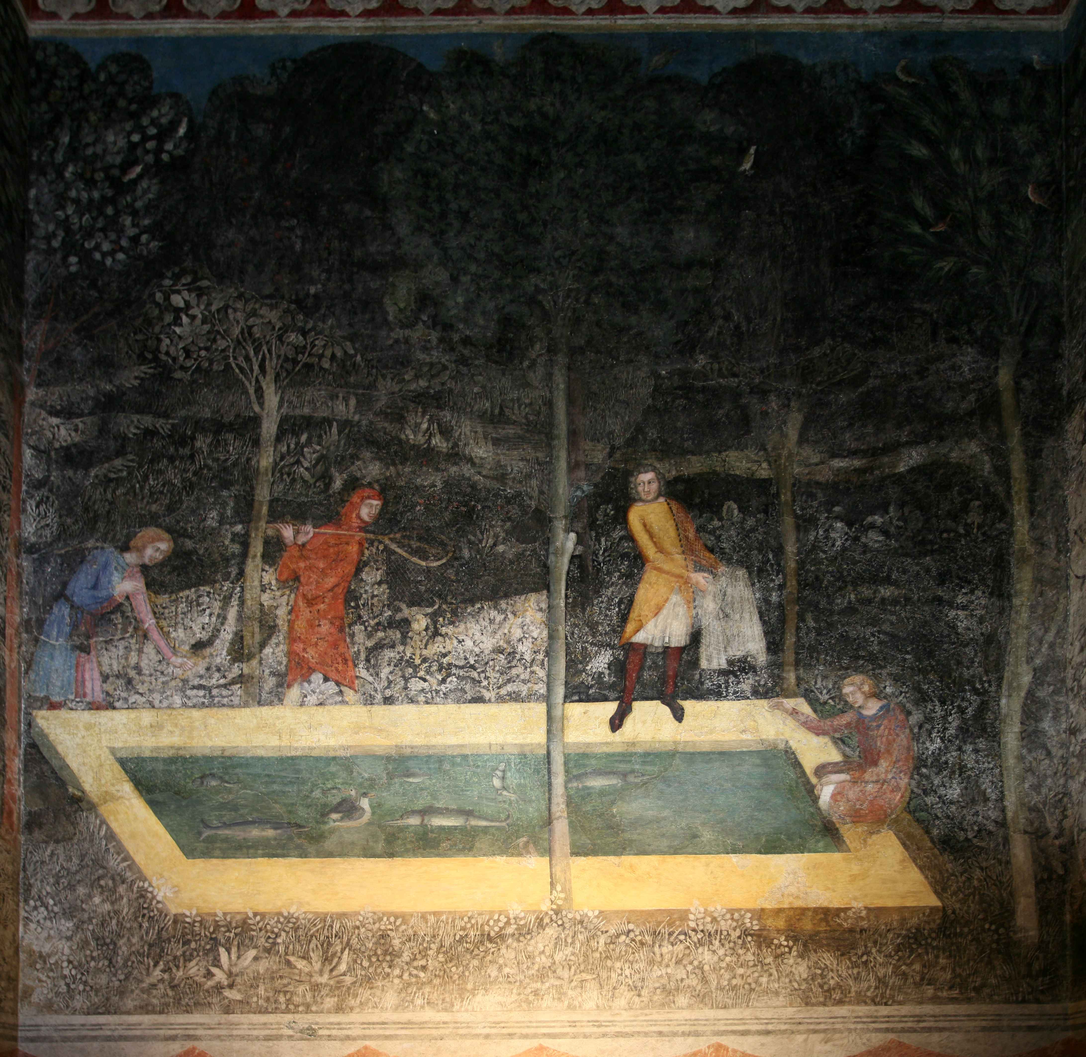 chambre du cerf - le bassin, Palais des Papes, Avignon, Vaucluse, France.